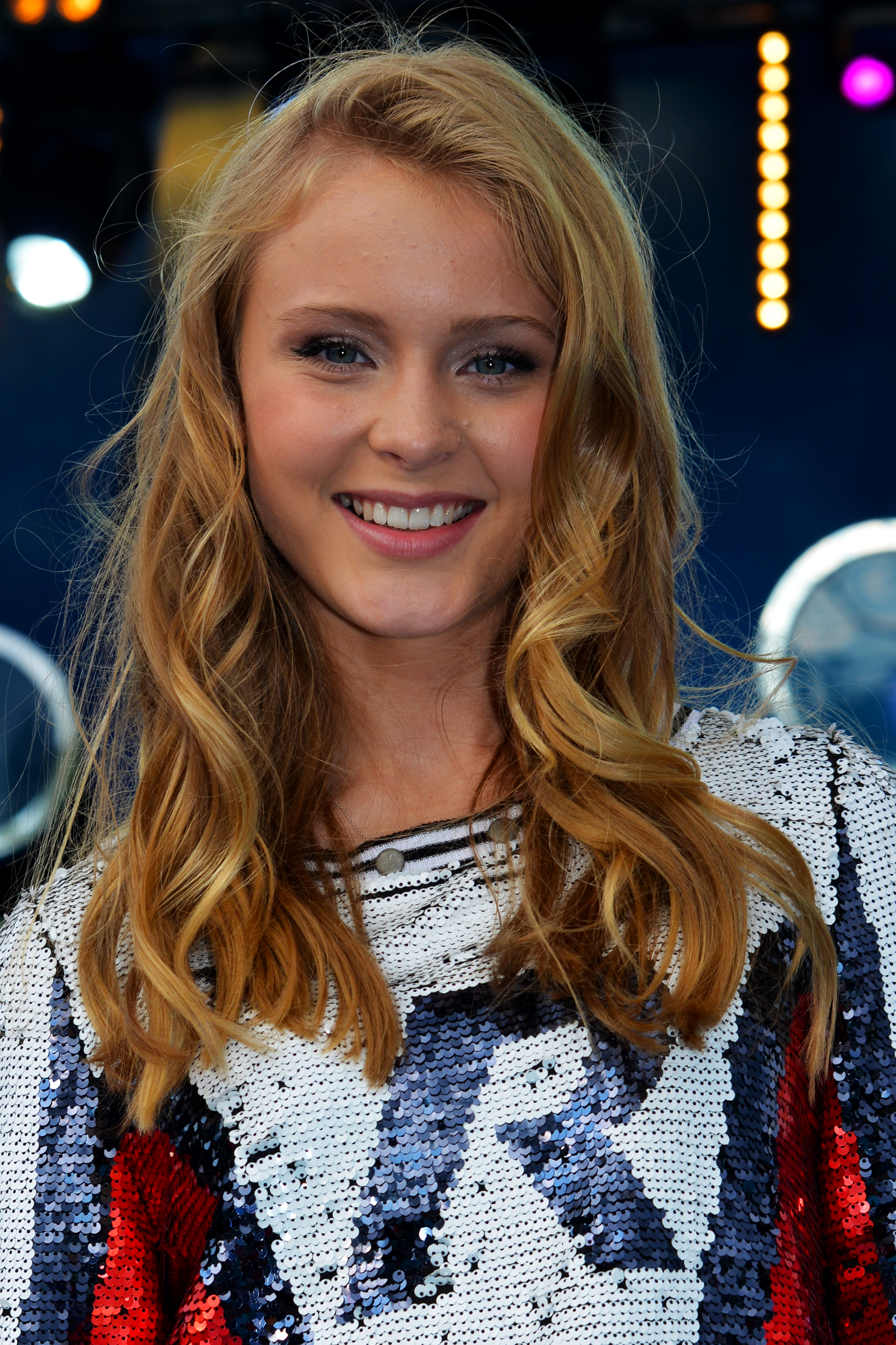 Zara Larsson poserar på Sommarkrysset i Stockholm inne på Gröna Lund.